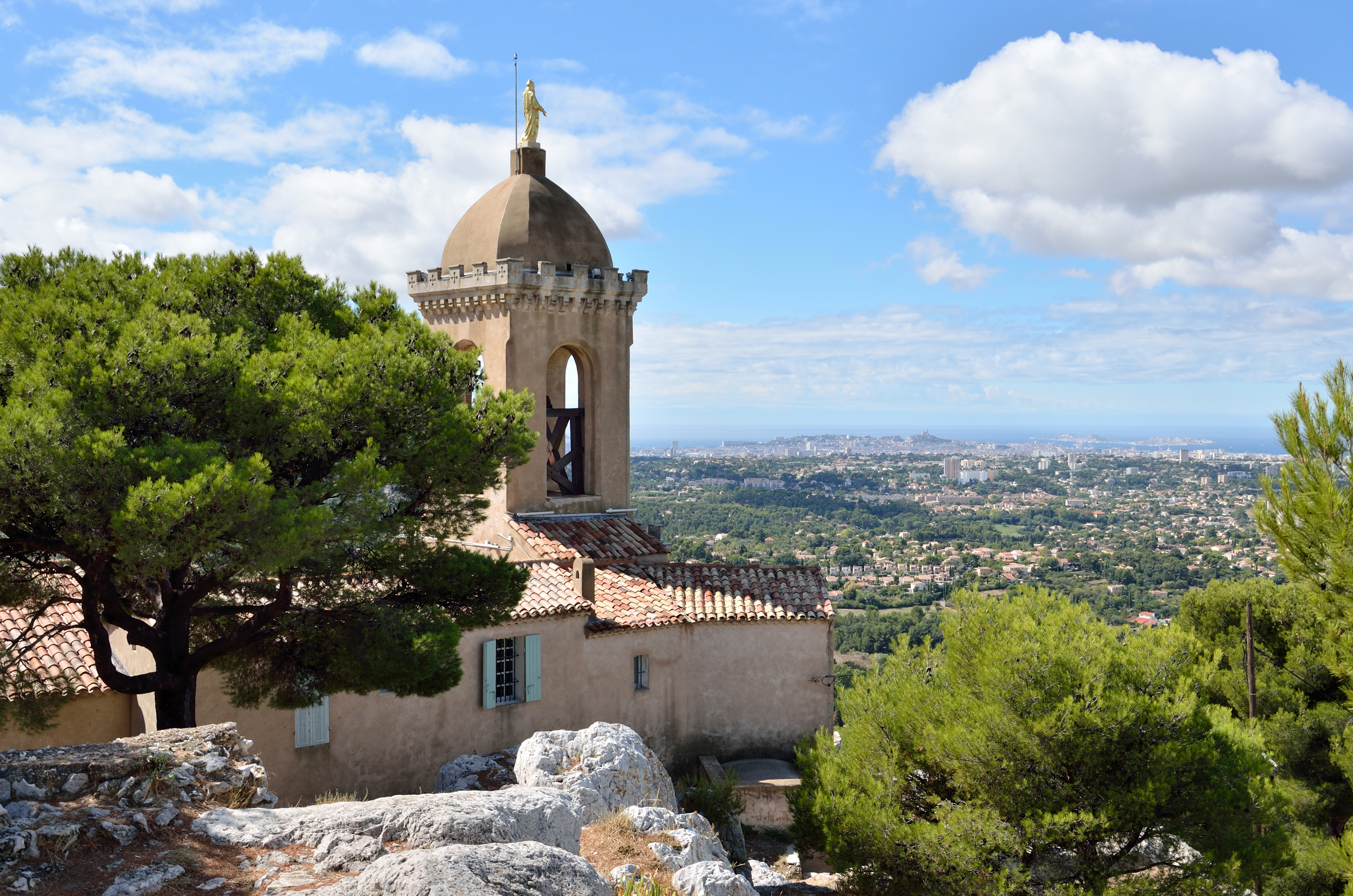 Chapelle Notre-Dame du Château, à Allauch (Bouches-du-Rhône). Depuis le sommet, la vue s'étend jusqu'à l'archipel du Frioul.